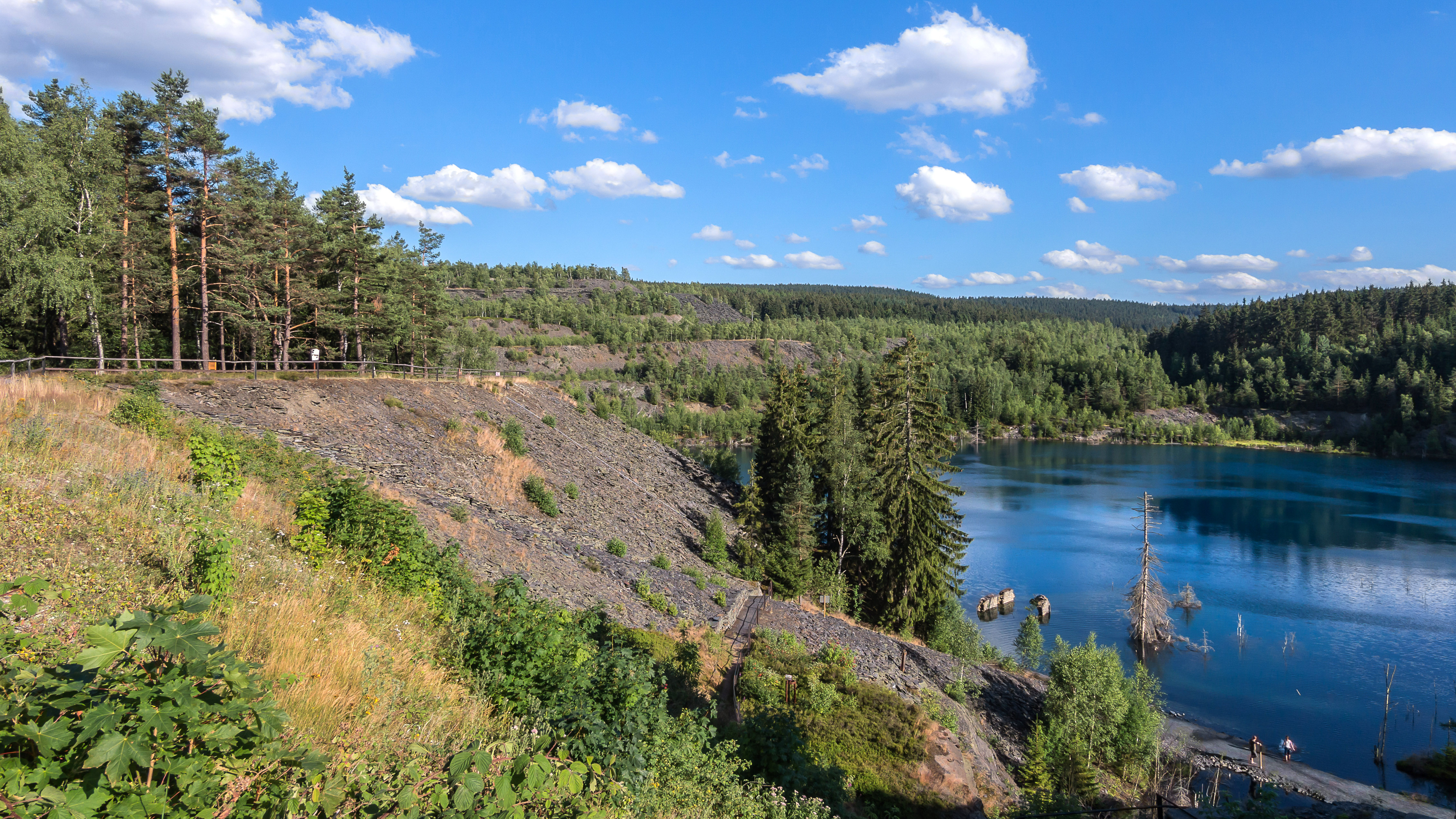 Schiefersee und Schutthalde im Naturschutzgebiet „Staatsbruch Lehesten“ (NSG 285) in Lehesten, Landkreis Saalfeld-Rudolstadt (Thüringen) – Der Bereich „Schieferbergbau bei Lehesten“ wurde als Nationaler Geotop ausgezeichnet. Im 13. Jahrhundert begannen in diesem Gebiet bergmännische Tätigkeiten. Die stillgelegten Steinbrüche, Stollen und Schächte sowie die Halden sind Lebensraum für zahlreiche seltene Tier- und Pflanzenarten. In diesem zum Teil schlecht zugänglichen (und nur auf den Wegen begehbaren) Areal haben sich mittlerweile 170 Arten der „Roten Liste“, also vom Aussterben bedrohter Pflanzen und Tiere, angesiedelt.